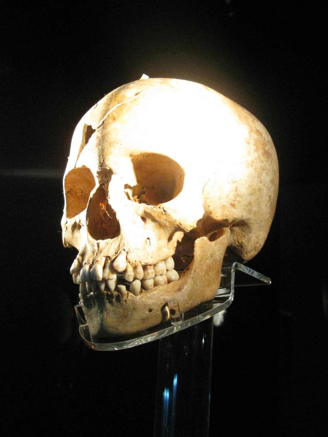 "Μyrtis: Face to face with the past" (A Temporary Exhibition at the National Archaeological Museum, Athens). "... [the exhibition] presents the results of an important interdisciplinary enterprise. The focal exhibit is the reconstructed face of an anonymous 11 year old Athenian girl who was –along with Perikles- one of the tens of thousands victims of typhoid fever in the year 430 BC, the second year of the Peloponnesian war between Athens and Sparta and their allies..." For --- Μύρτις... 24 αιώνες μετά η Μύρτις αντικρίζει τους πολίτες του 21ου αιώνα. "Μύρτις. Πρόσωπο με πρόσωπο με το παρελθόν (περιοδική έκθεση στο Εθνικό Αρχαιολογικό Μουσείο). "...Πρόκειται για την παρουσίαση ενός σημαντικού διεπιστημονικού επιτεύγματος. Κεντρικό έκθεμα είναι το αναπλασμένο πρόσωπο της ανώνυμης 11χρονης Αθηναίας, που υπήρξε και αυτή, όπως και ο μέγας Περικλής, ένα από τα δεκάδες χιλιάδες θύματα του τυφοειδούς πυρετού του 430 π.Χ...." Για περισσότερες πληροφορίες